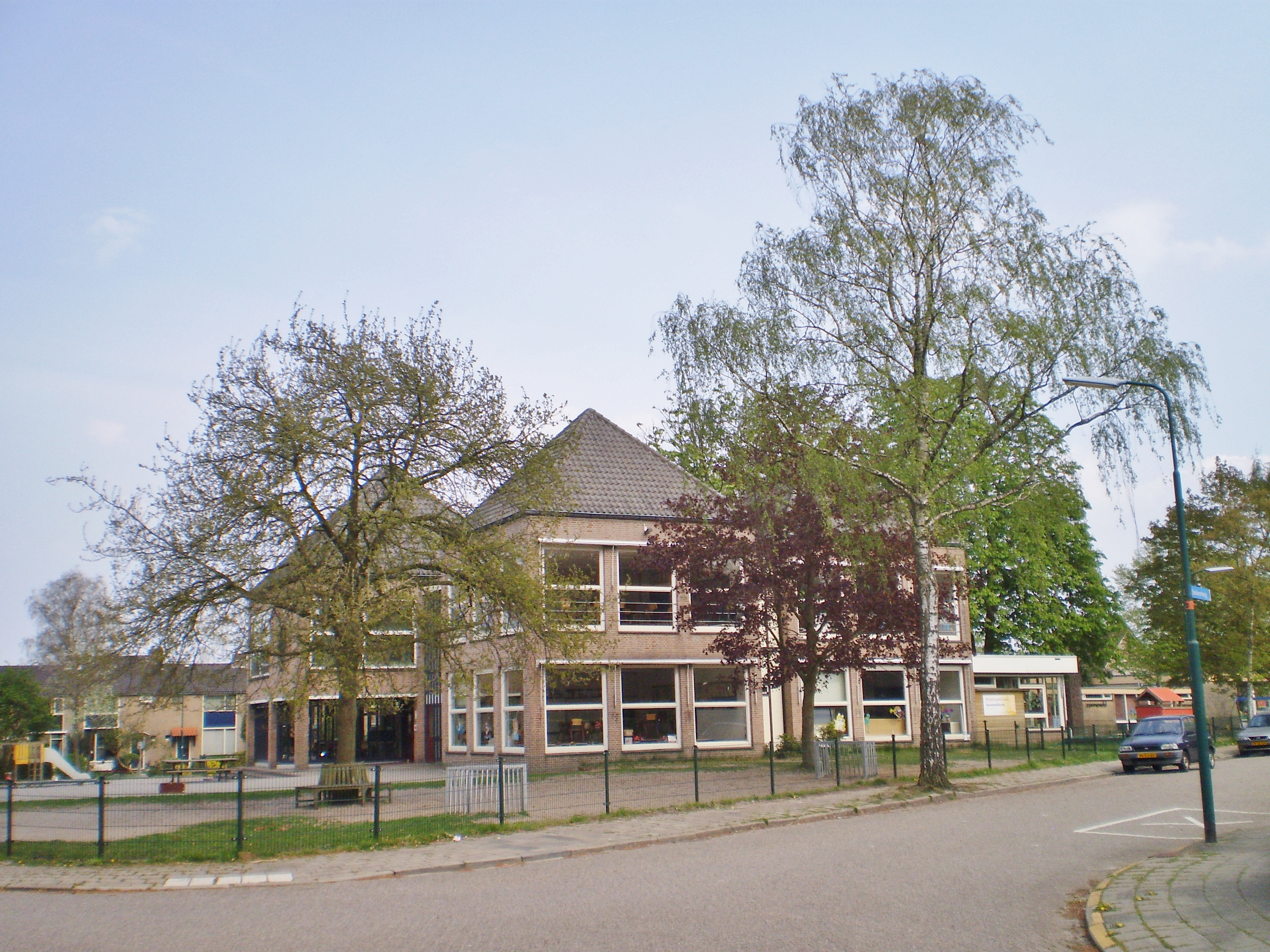 school gaat over enige tijd op in een nieuw te bouwen brede school